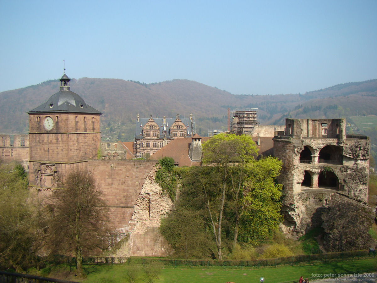 Blick vom Schloss-Wolfsbrunnenweg auf das Schloss in Heidelberg